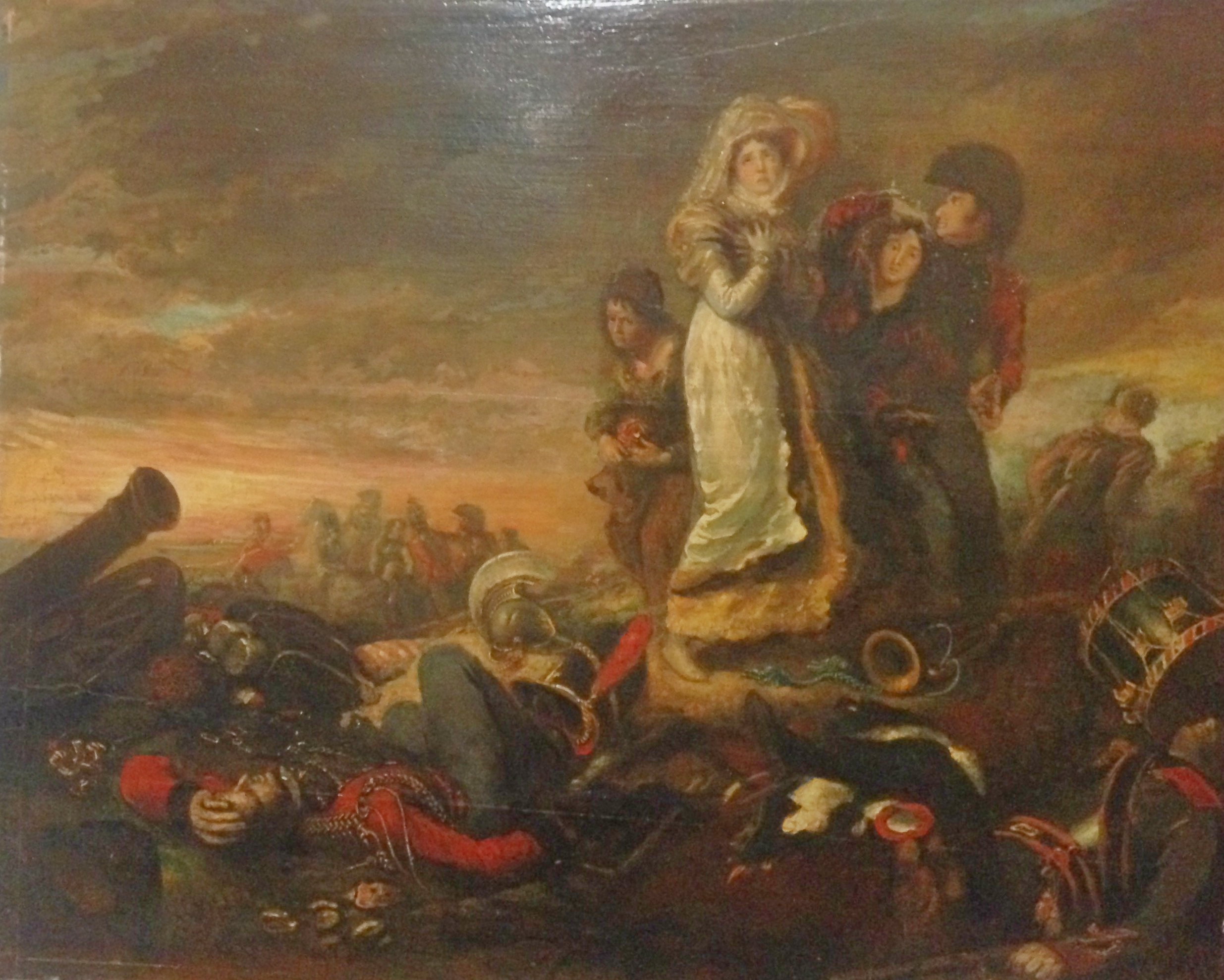 After Waterloo por Samuel Drumond, obra presentada al concurso de 1816 de la ARA (Royal Academy of Arts). Oleo sobre tabla.